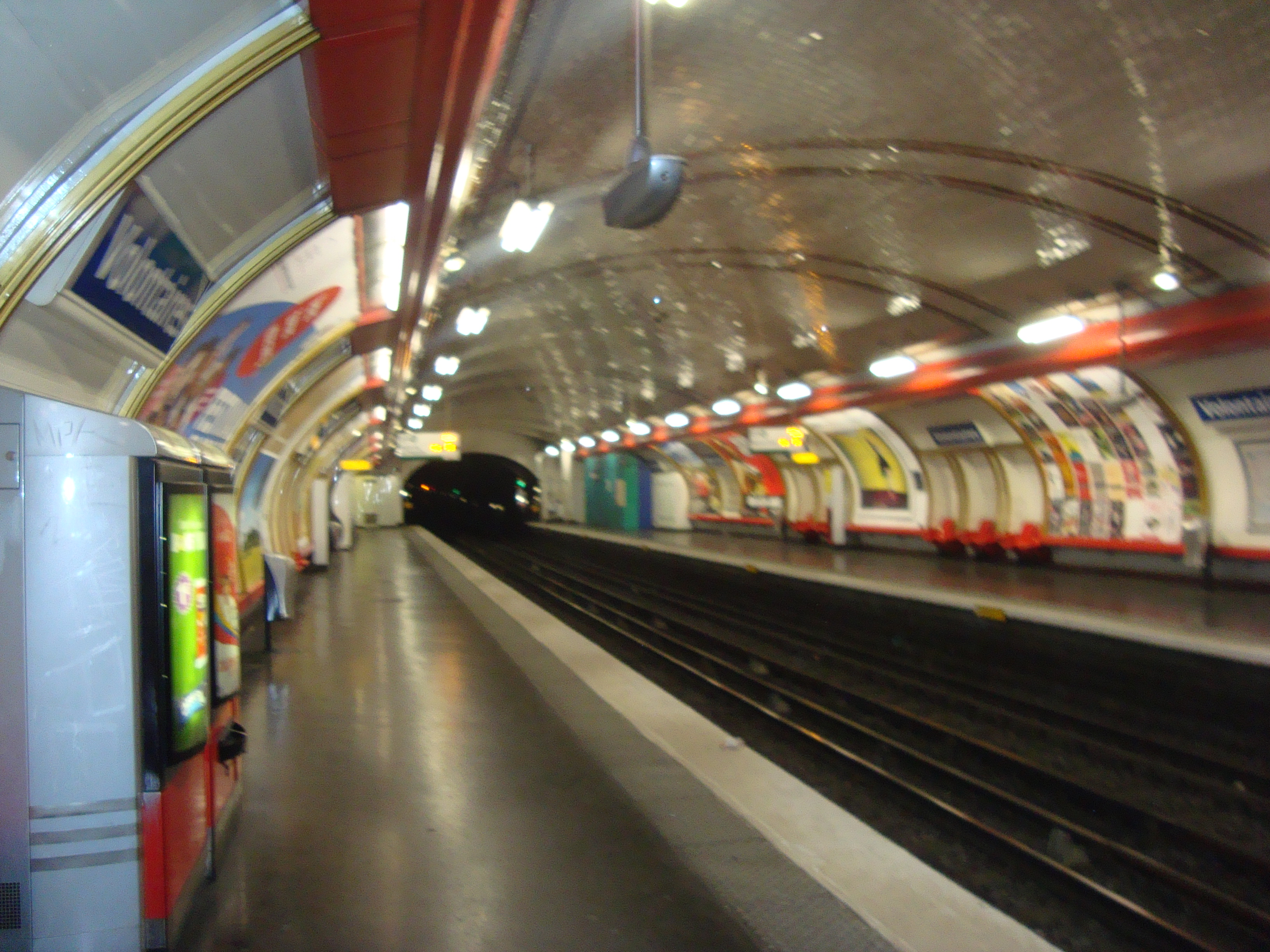 Quais de la station Volontaires de la ligne 12 du métro de Paris.